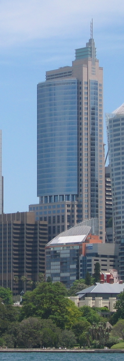 Chifley Tower v Sydneyu.